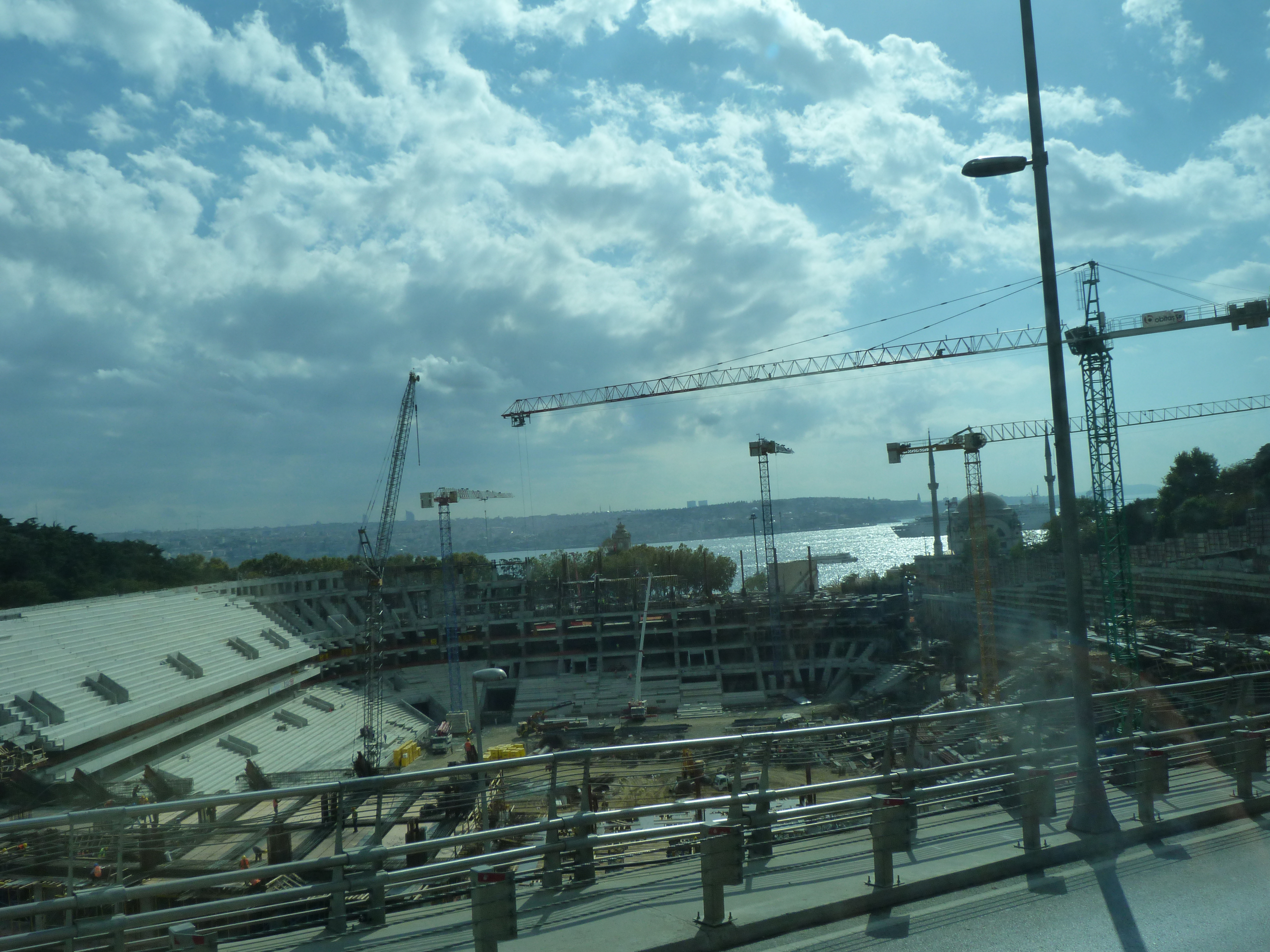 A felvétel 2014. október 24-én készült. Törökország, Isztambul. Stadion építés. ©© Derzsi Elekes Andor, Budapest, 2014, A kép egészben, vagy részletekben másolását, bármilyen úton történő sokszorosítását és felhasználását a szerző ellenérték nélkül, jogutódjaira is kihatóan megengedi. Az engedély kiterjed a kereskedelmi célú hasznosításra is. Kéri azonban nevének feltüntetését a felhasználás során. A Metapolisz sorozat valamennyi képe és filmje Creative Commons alatti valamint kereskedelmi - for profit - célra is felhasználható. Ajánlott hivatkozás: Derzsi Elekes Andor: Metapolisz DVD line